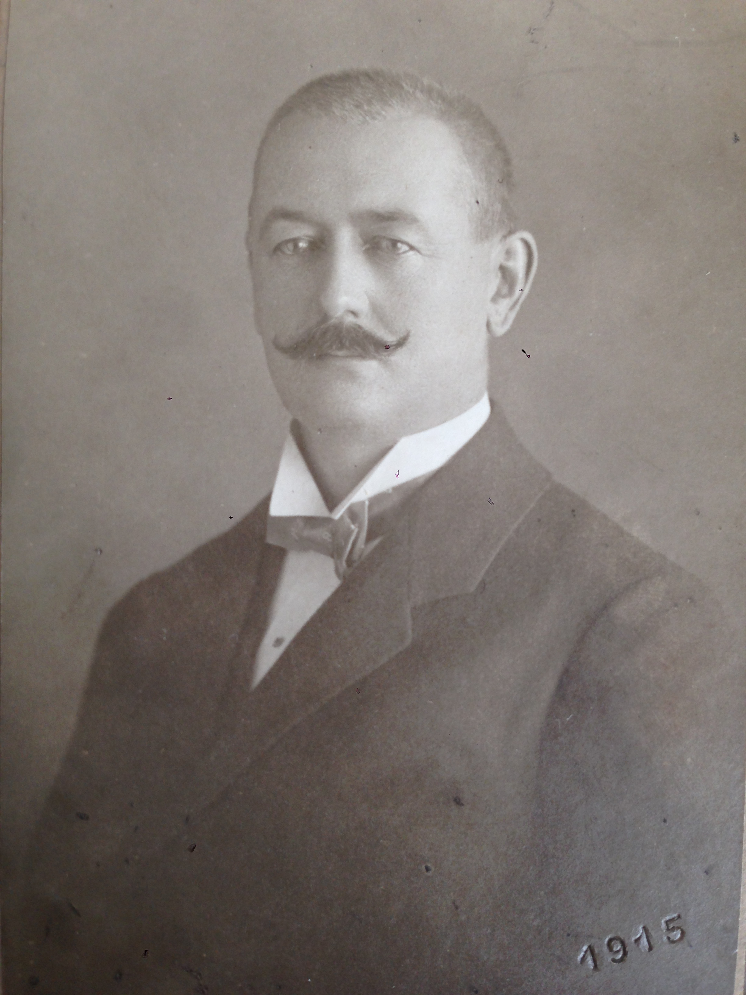 Ing. Jindřich Doležal, rok 1915